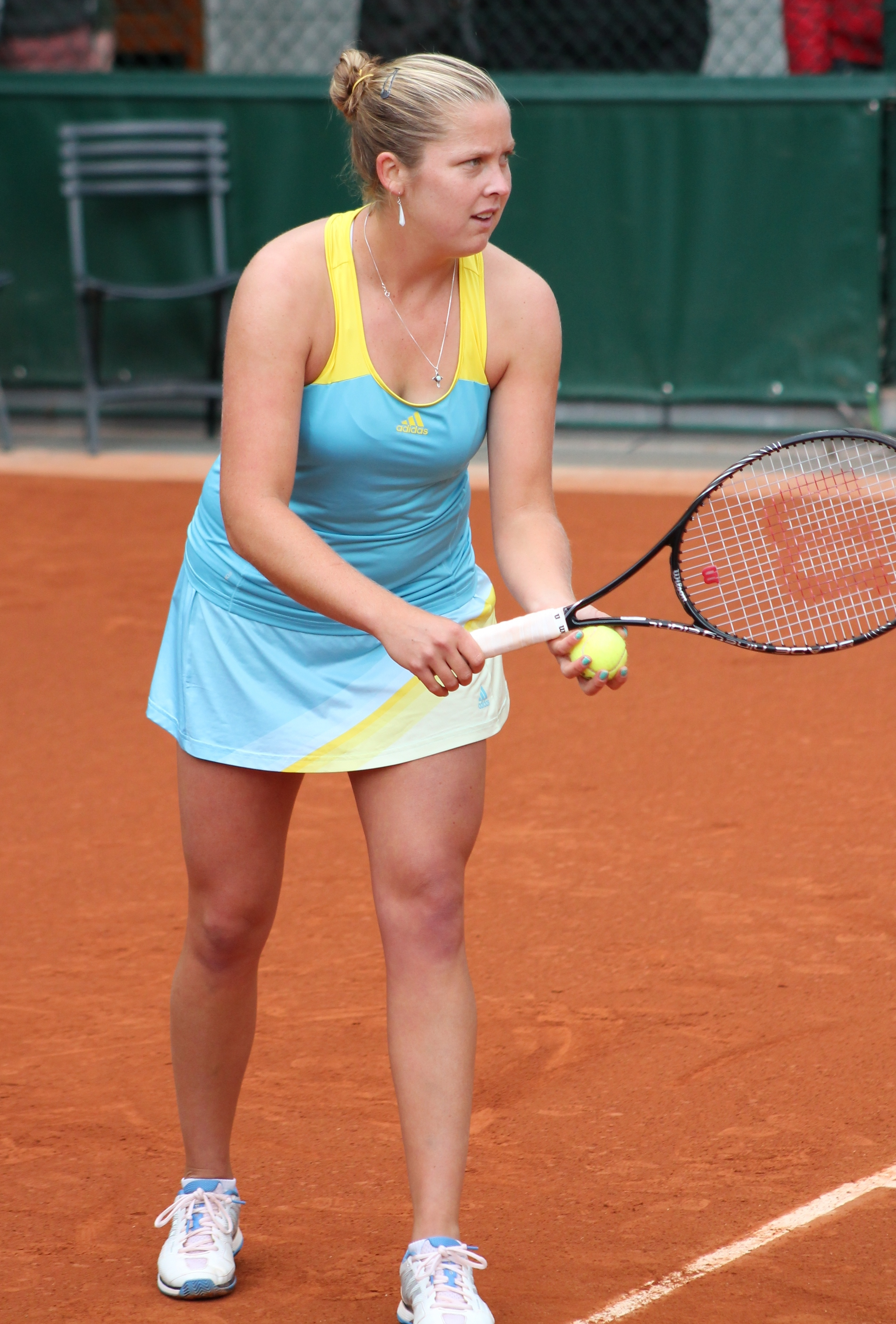 Rogers RG13 (5)